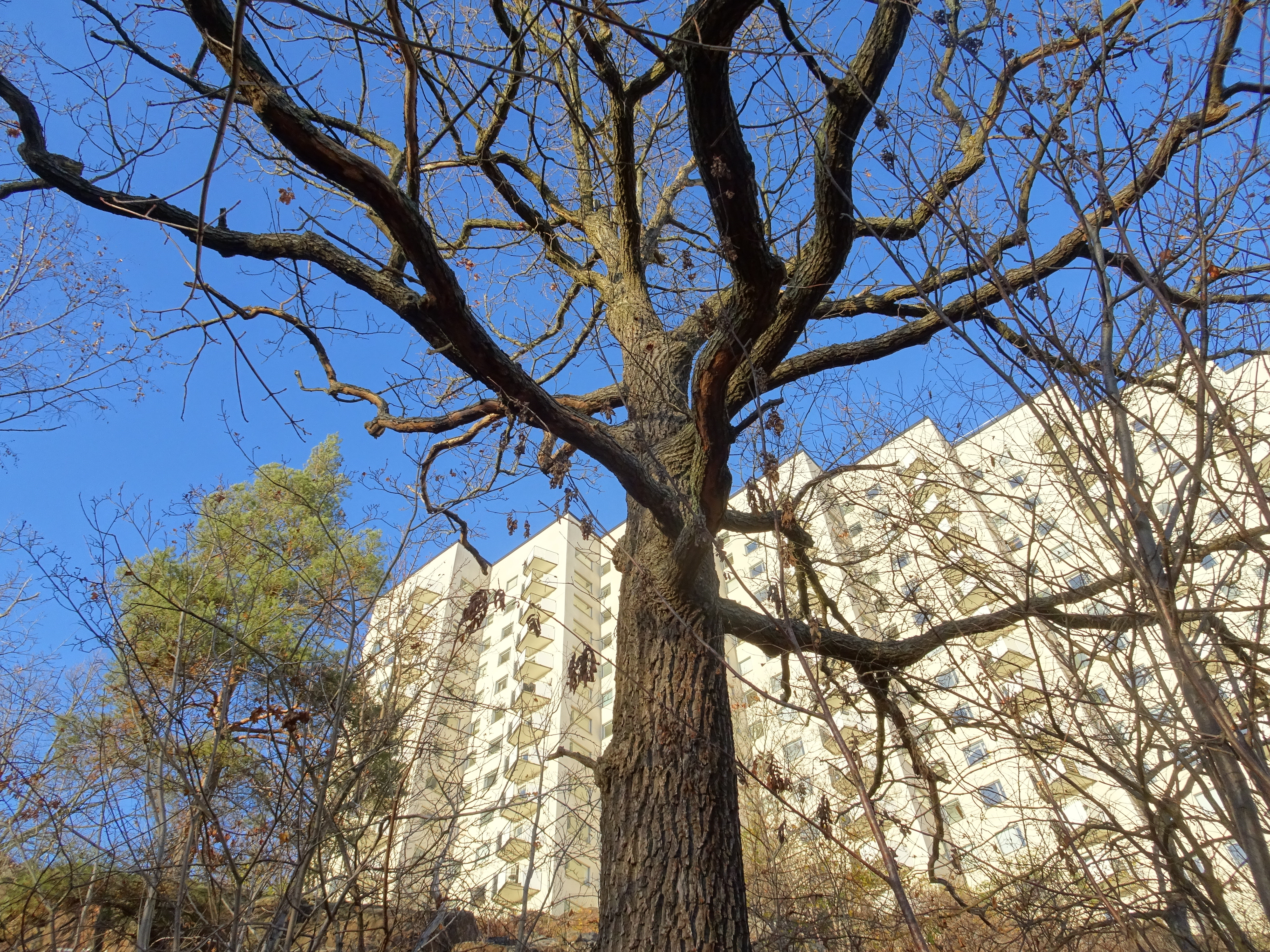 I bergssluttningen cirka 30-40 meter söder om höghuset på Fyrverkarbacken 23 i Marieberg, Kungsholmen växer "Linnés päronträd".